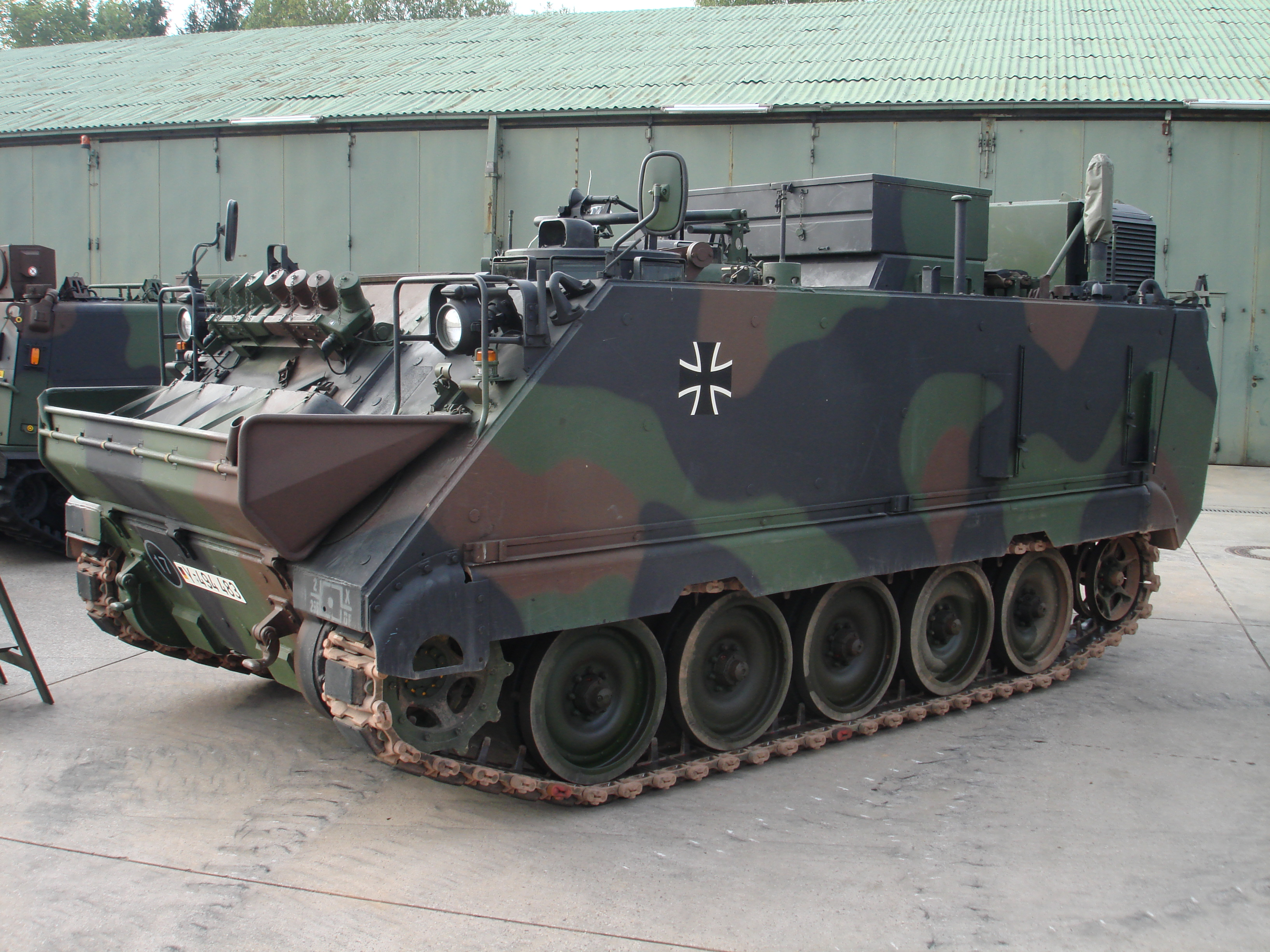 M113 als Geräteträger für das Führungssystem ADLER (Artillerie-, Daten-, Lage- und Einsatz Rechnerverbund). Die Fahrzeuge stellen mit ihren Funkgeräten die Kommunikation und den Datenaustausch der Gefechtsstände bis zur Zugebene her. Sie dienen ebenfalls als Feuerleitfahrzeug in den Artilleriezügen.